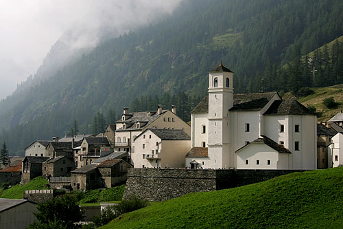 Simplon-Dorf